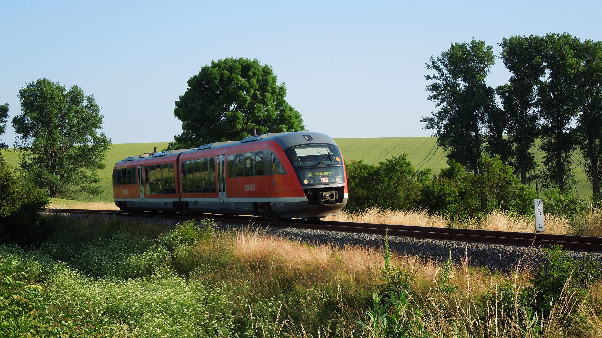 Regionalexpress der Deutschen Bahn AG auf der Strecke Erfurt-Nordhausen in der Nähe des Bahnhofs Niederspier. Der Siemens Desiro Classic ist ein von Siemens Mobility (vormals Siemens Transportation Systems) hergestellter Nahverkehrstriebzug. In Deutschland werden die Fahrzeuge vor allem im Nahverkehr der Bundesländer Bayern, Brandenburg, Sachsen, Sachsen-Anhalt, Mecklenburg-Vorpommern, Thüringen, Rheinland-Pfalz und im Saarland eingesetzt. Bei der Deutschen Bahn AG ist der Triebwagen als Baureihe 642 unterwegs.